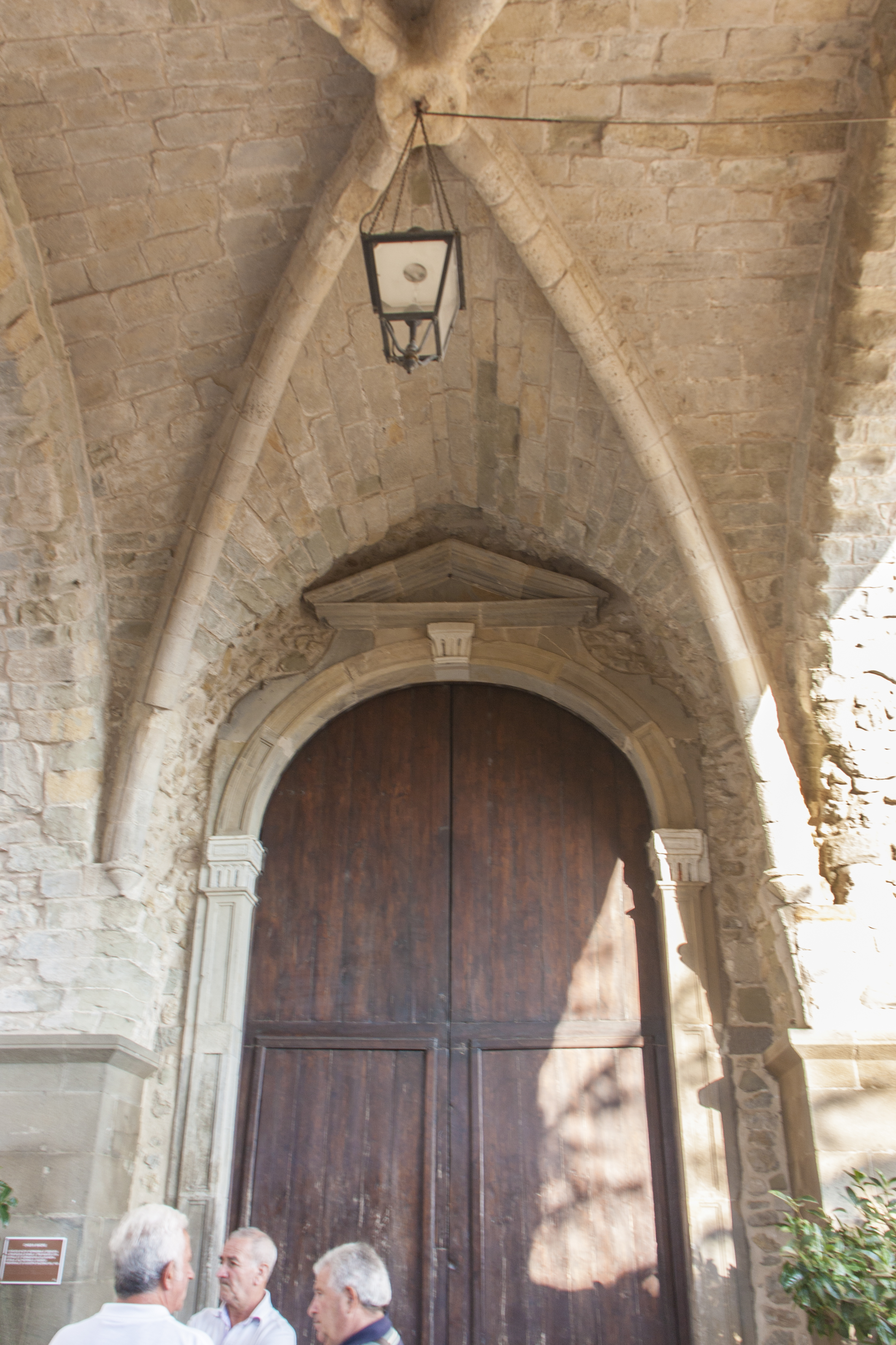 Ingresso Chiesa Madre di Gangi